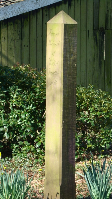 Gemeentemonument in Bredevoort